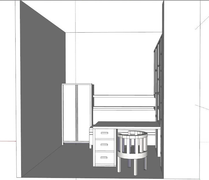 CAMERA PER UN RAGAZZO2-ADAMI E MASERA